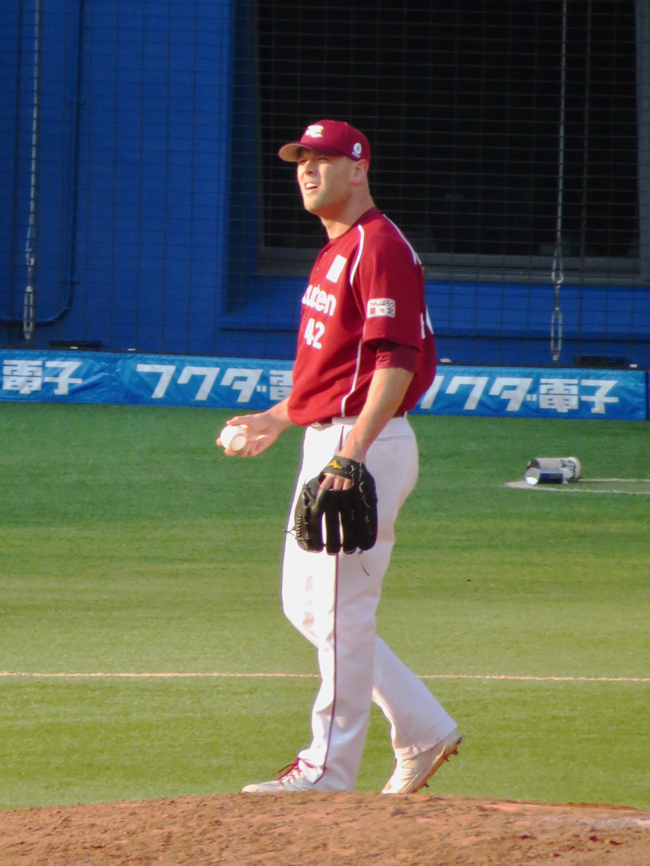 東北楽天ゴールデンイーグルス投手のフランク・ジョセフ・ハーマン。ZOZOマリンスタジアムにて。